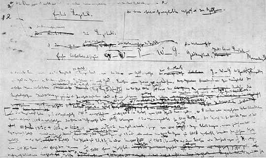 Eine Faksimile Reproduktion einer original Manuskriptseite des Kapitals Zweiter Band. Erstes Kapitel von Karl Marx.